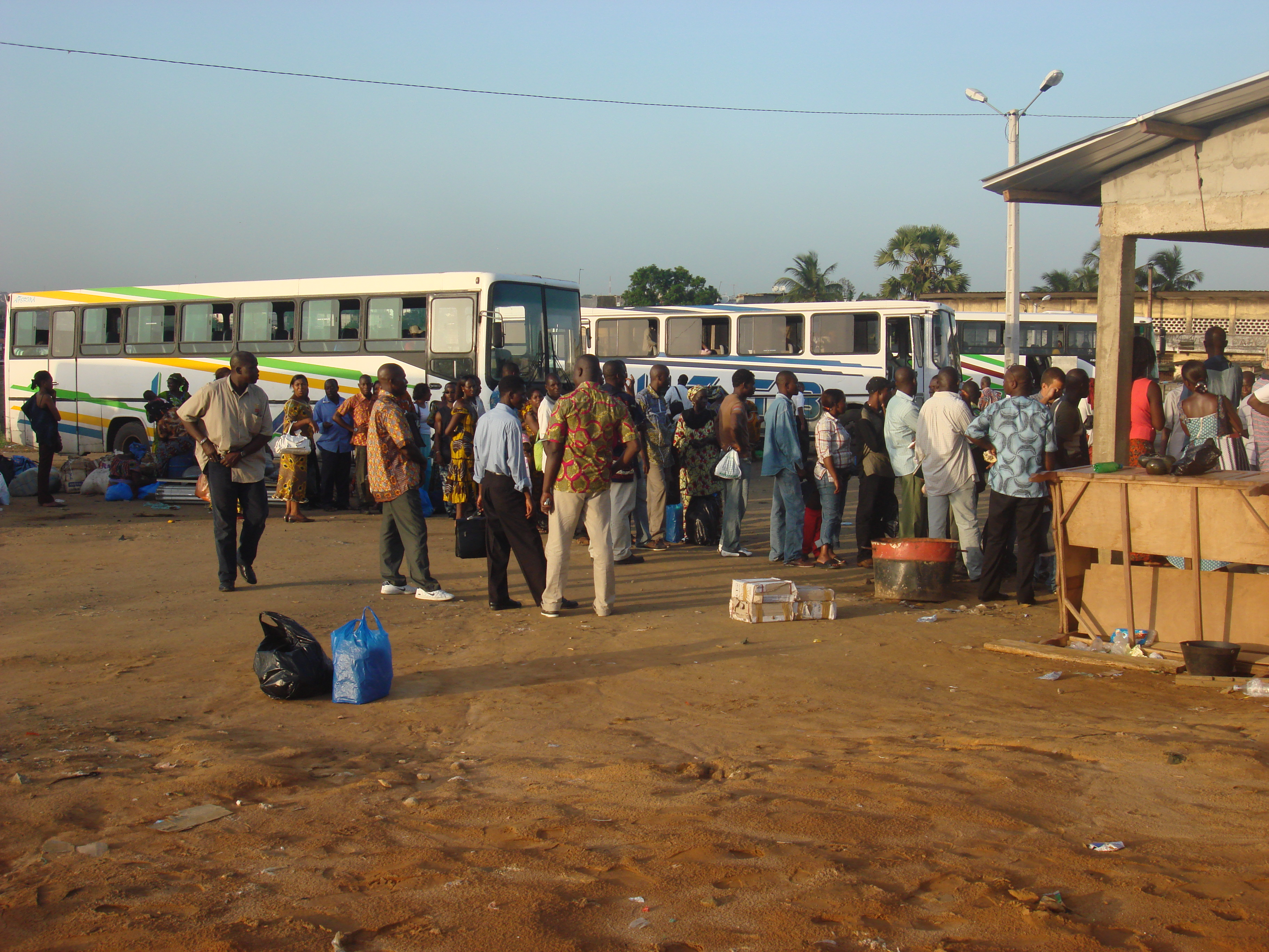 Gare routière à Abidjan (Côte d'Ivoire)